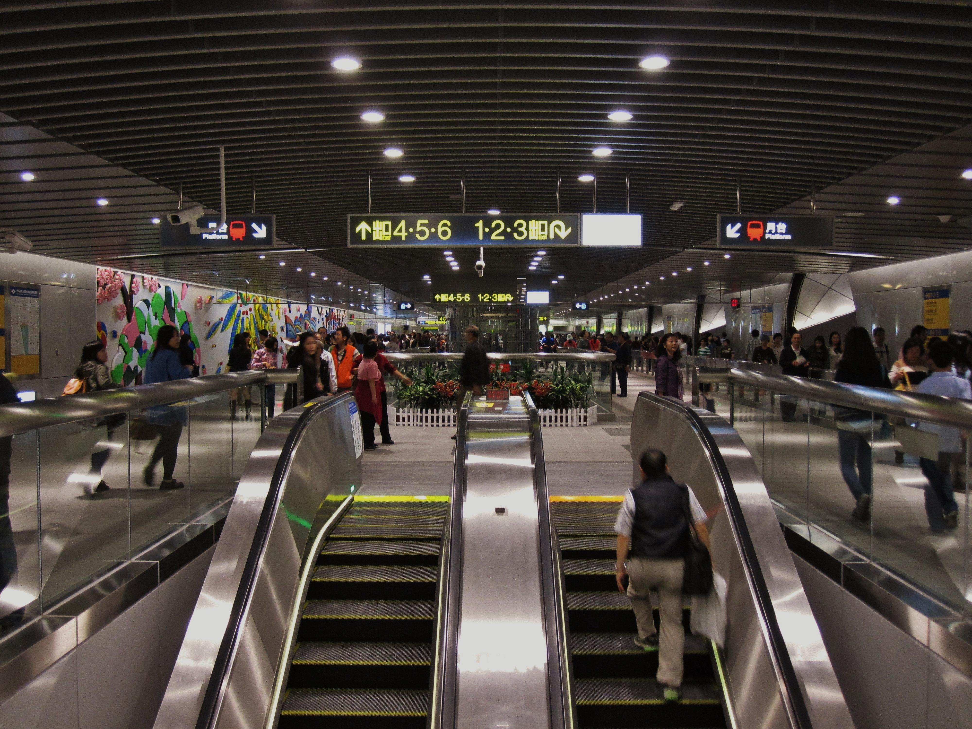 台北捷運信義線大安森林公園站B1穿堂層